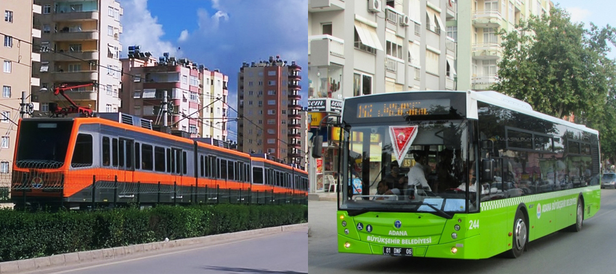 Adana Metrosu ve Adana Belediye Otobüsü.